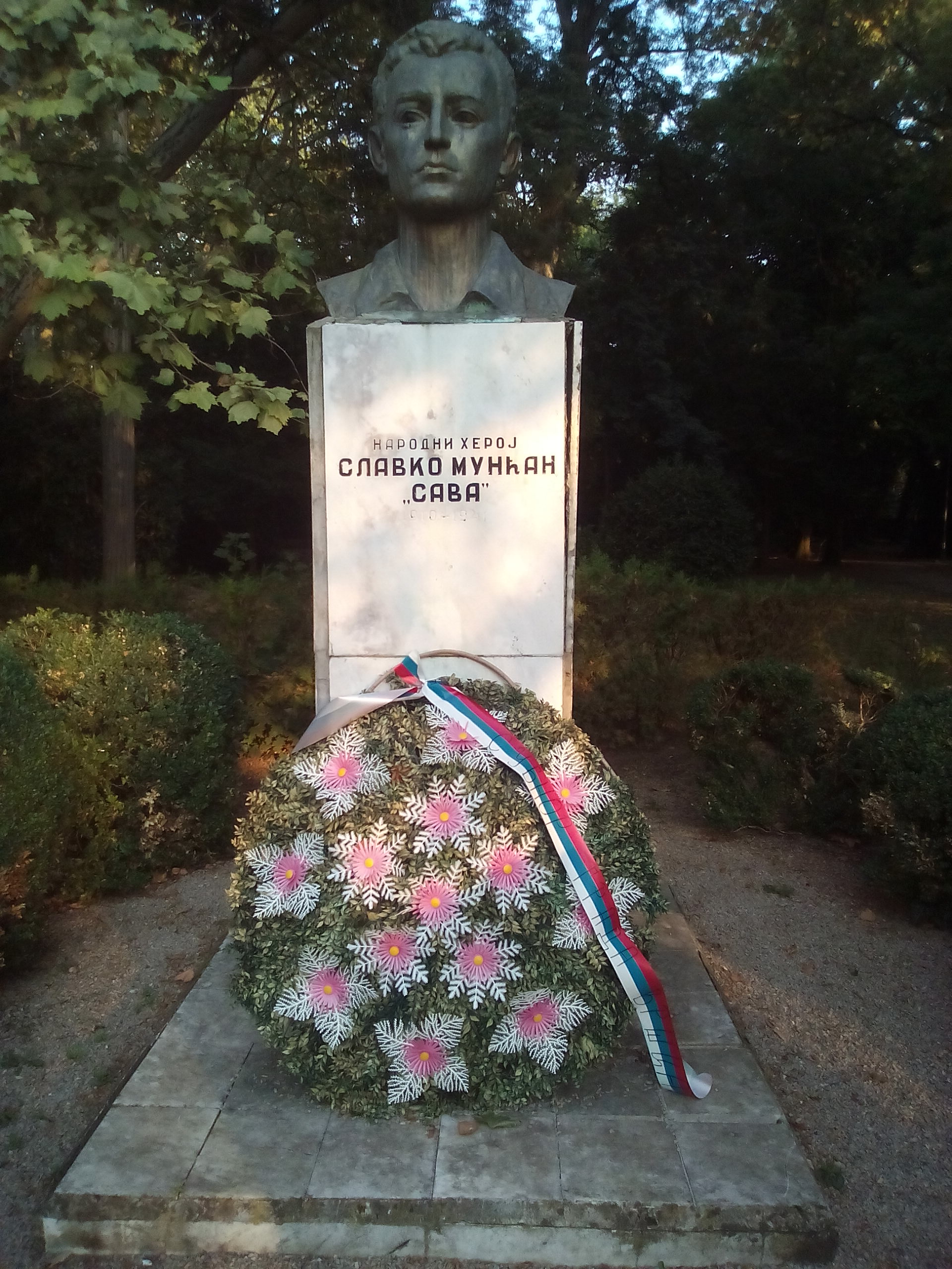 Споменик Славку Мунћану у Вршцу